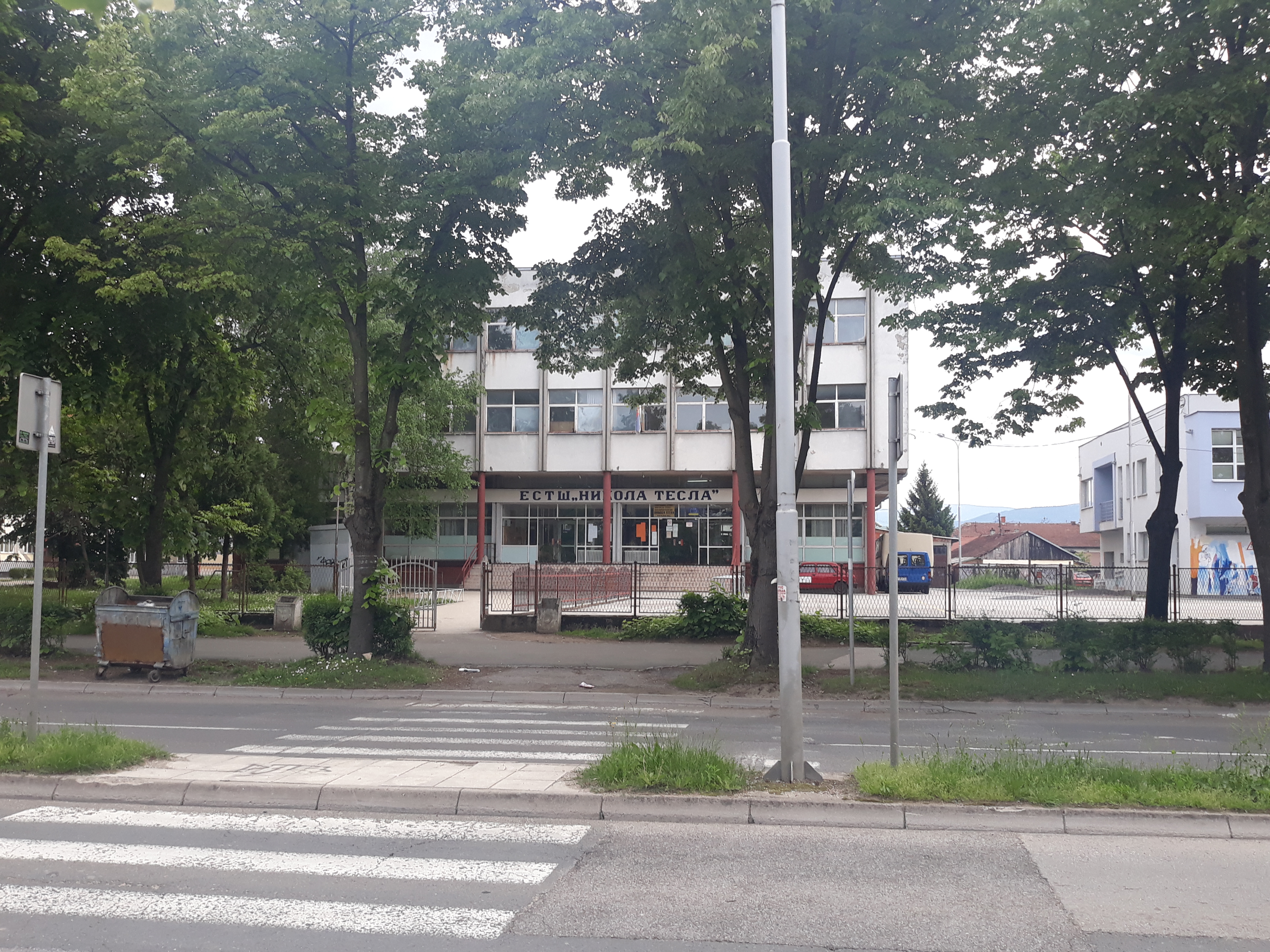 Електро-саобраћајна техничка школа „Никола Тесла“ Краљево